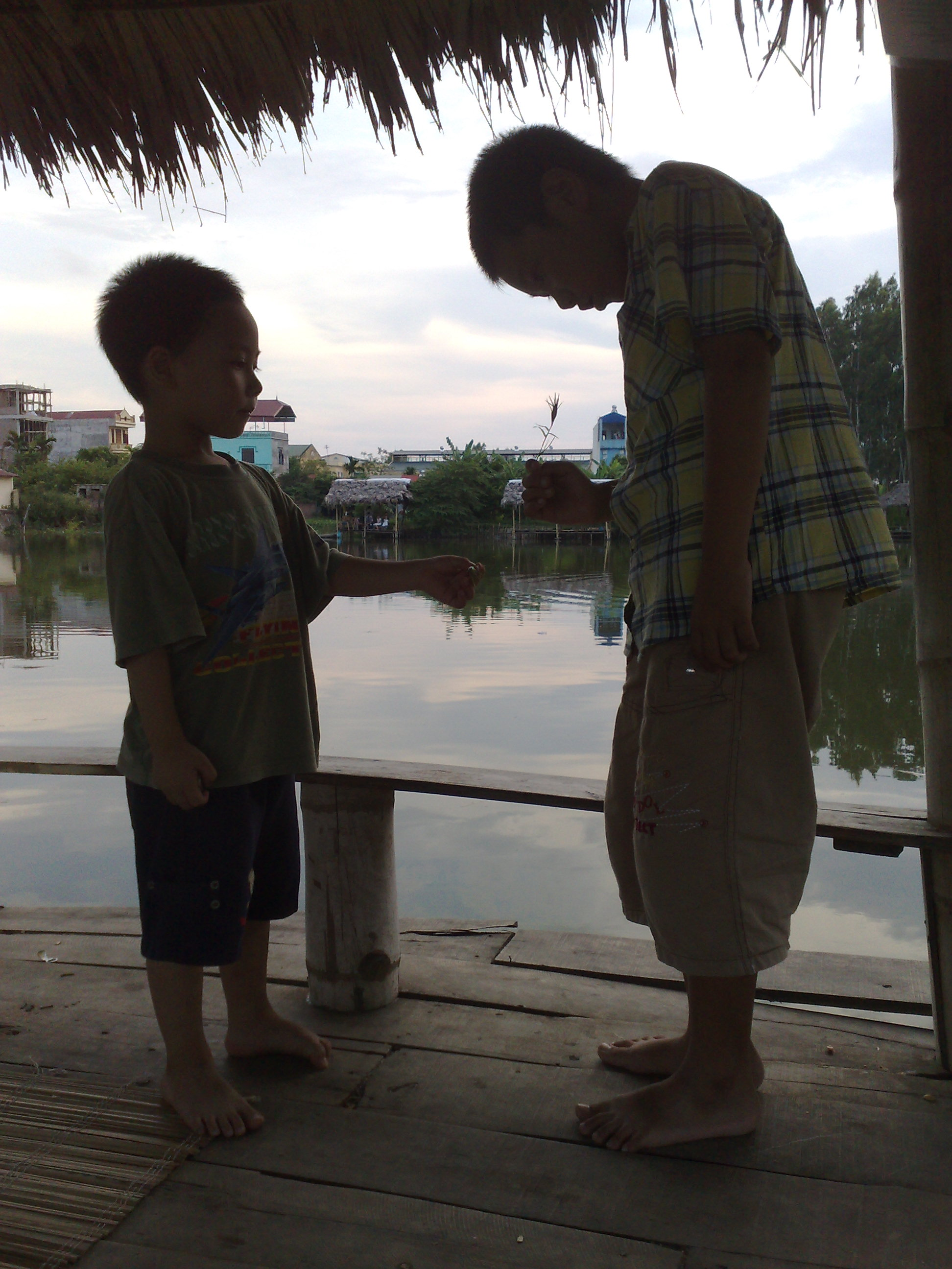 Hình trẻ em chơi "chọi cỏ gà", tôi tự chụp và tải lên để minh họa cho bài viết Cỏ gà.